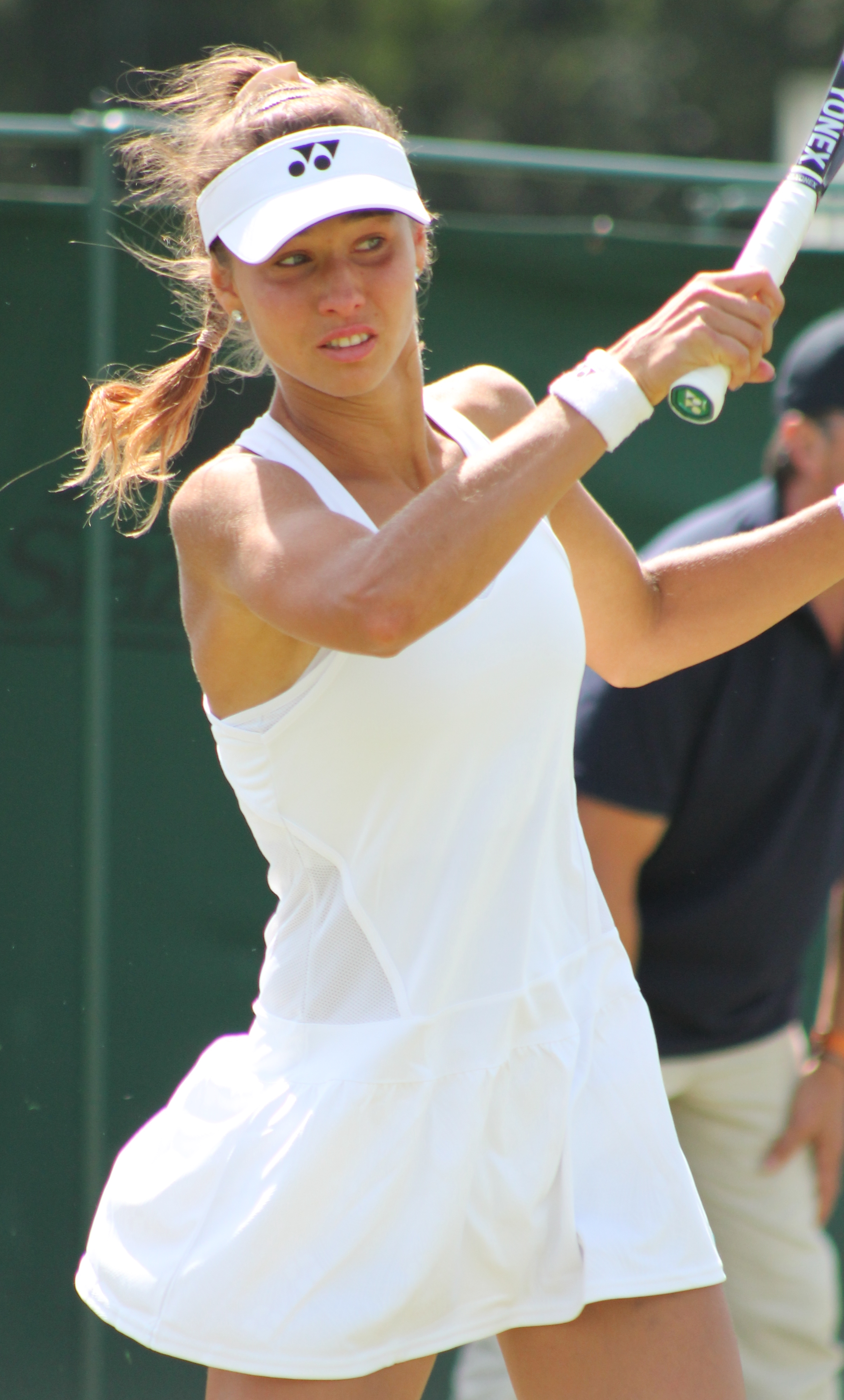 Diatchenko WMQ14 (19)